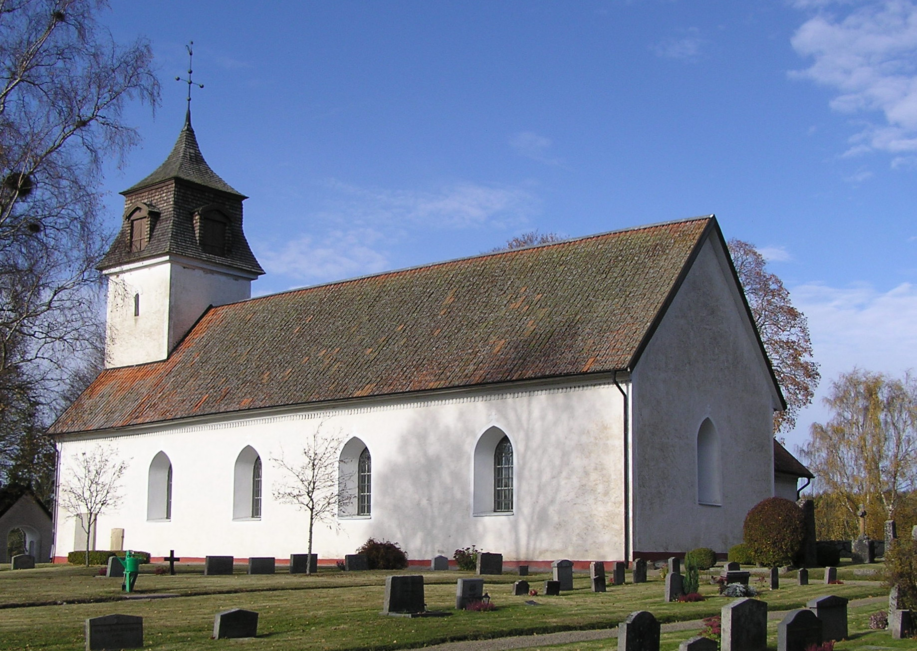 Årdala kyrka, Södermanland. Oktober 2007.